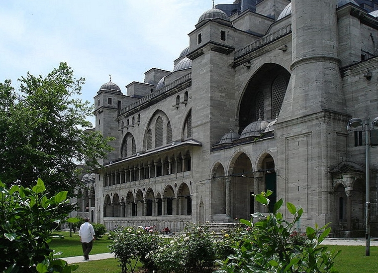 L'imponente finaco sinistro della Moschea di Solimano il Magnifico ad Istanbul. La moschea sorge al centro di un giardino. Foto di: Giovanni Dall'Orto, 26-5-2006.